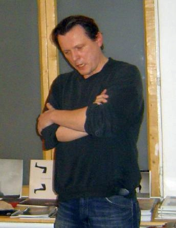 balabán